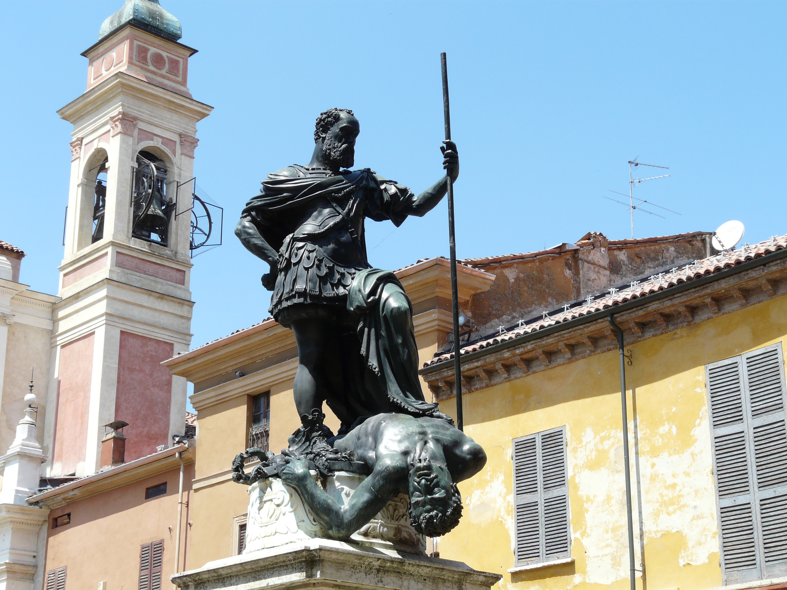 Monumento a Ferrante I Gonzaga, Guastalla, Emilia-Romagna, Italia